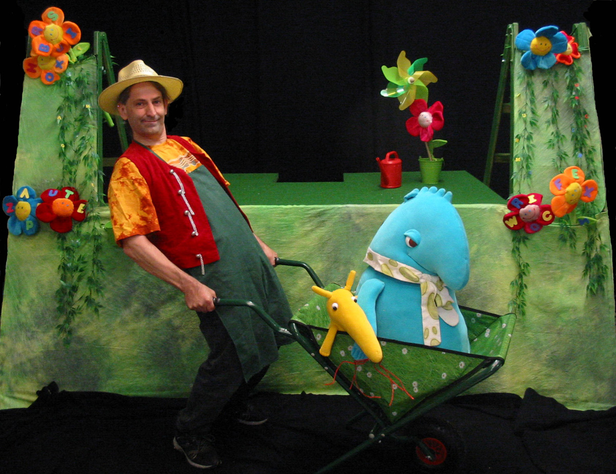 Der Zapperdockel und der Wock - eine streitbare Trostgeschichte für Kinder ab 4 Jahren.